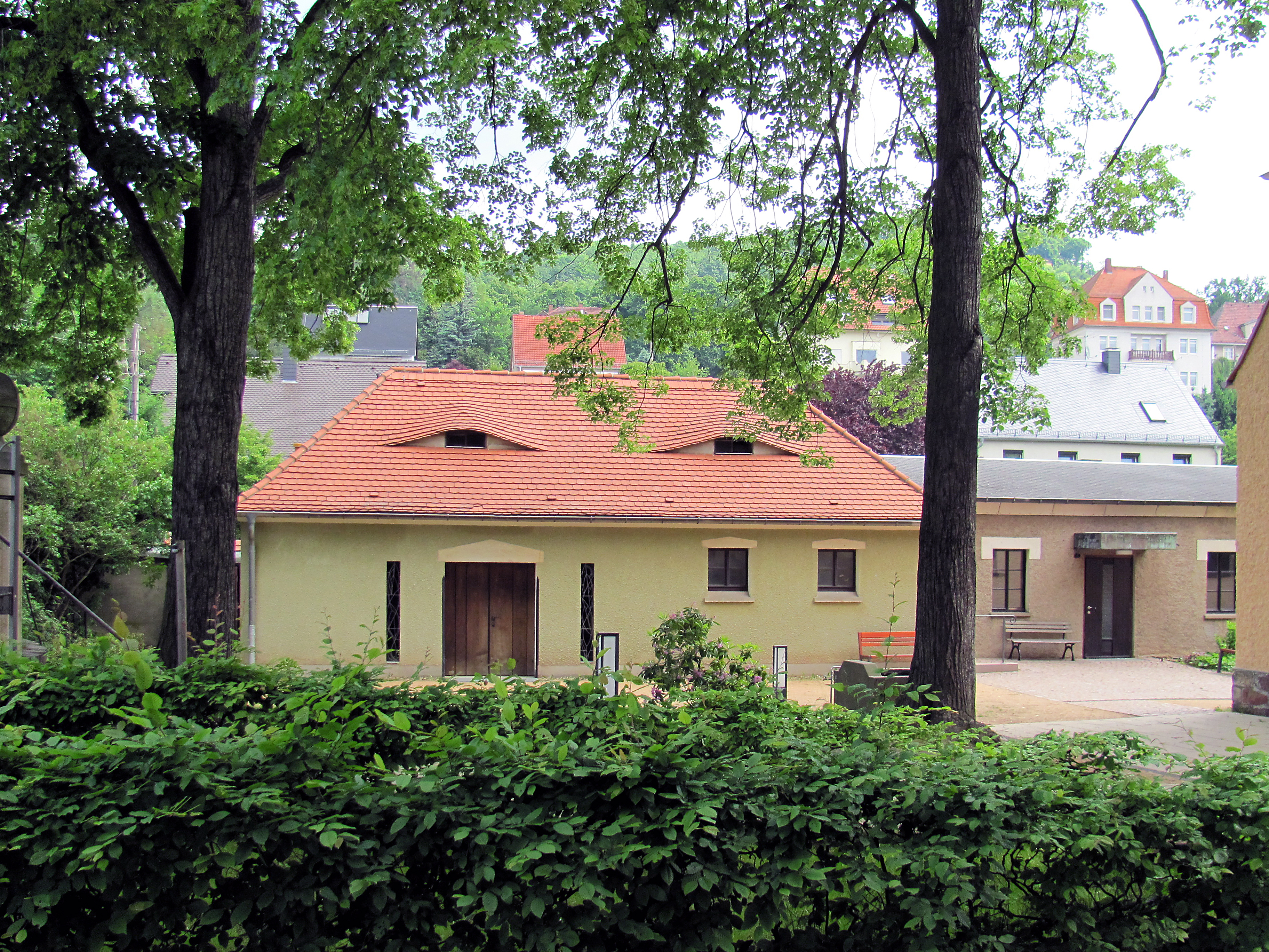 Radebeul, Friedhof Naundorf-Zitzschewig, Paul-Gerhardt-Haus